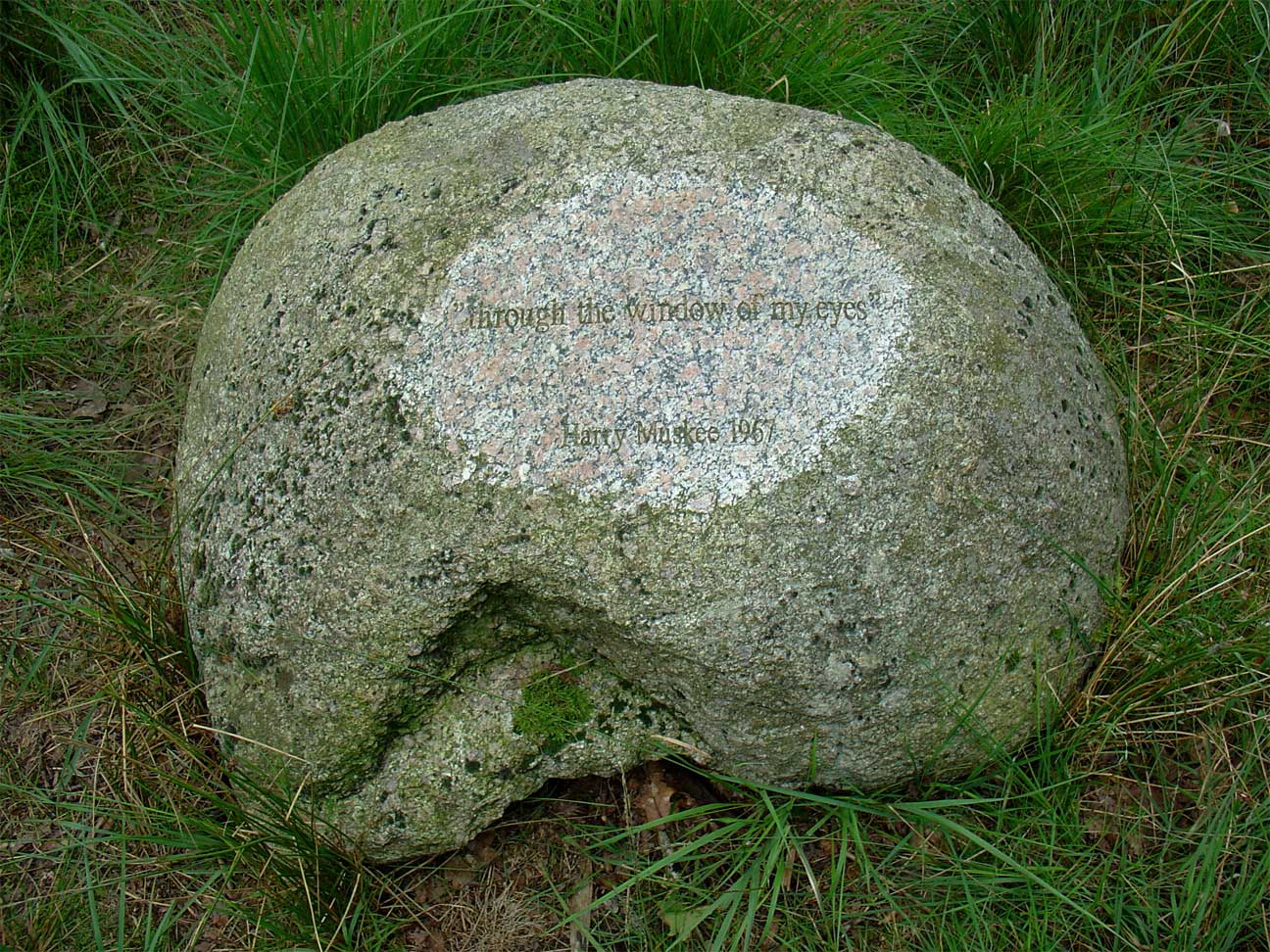 Through the window of my eyes - monument voor "Harry Muskee" (t.g.v. zijn 65e jaar) in het Grolloërveen (2006)